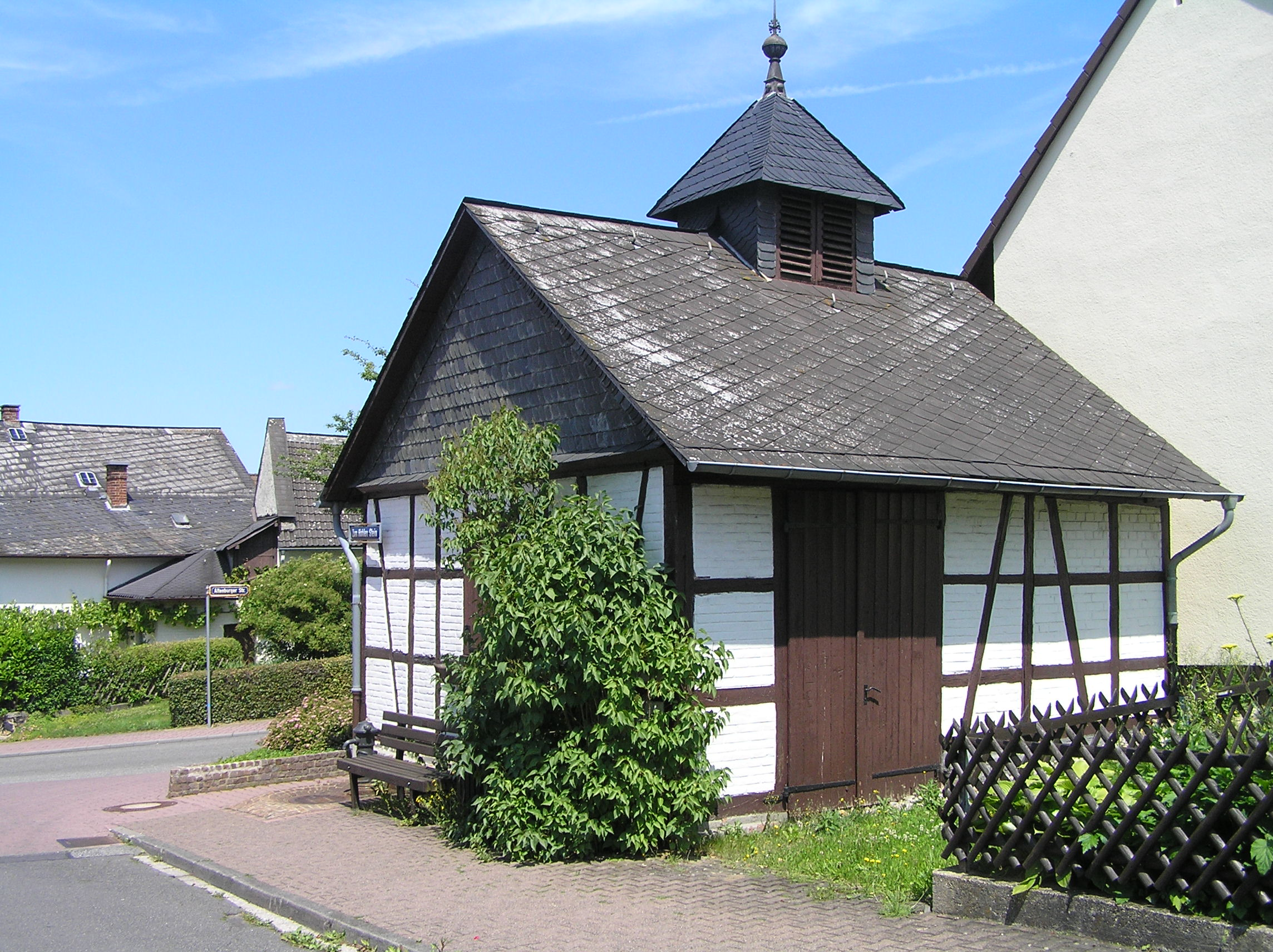 Oberseelbach, altesFeuerwehrgerätehaus. Kleiner Fachwerkbau des 19. Jh. mit Satteldach, heute Kulturdenkmal.